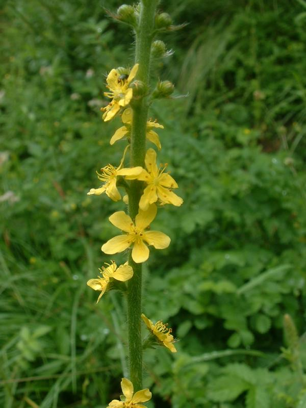 Aigremoine eupatoire, Vantoux-et-Longevelle, juillet 2004